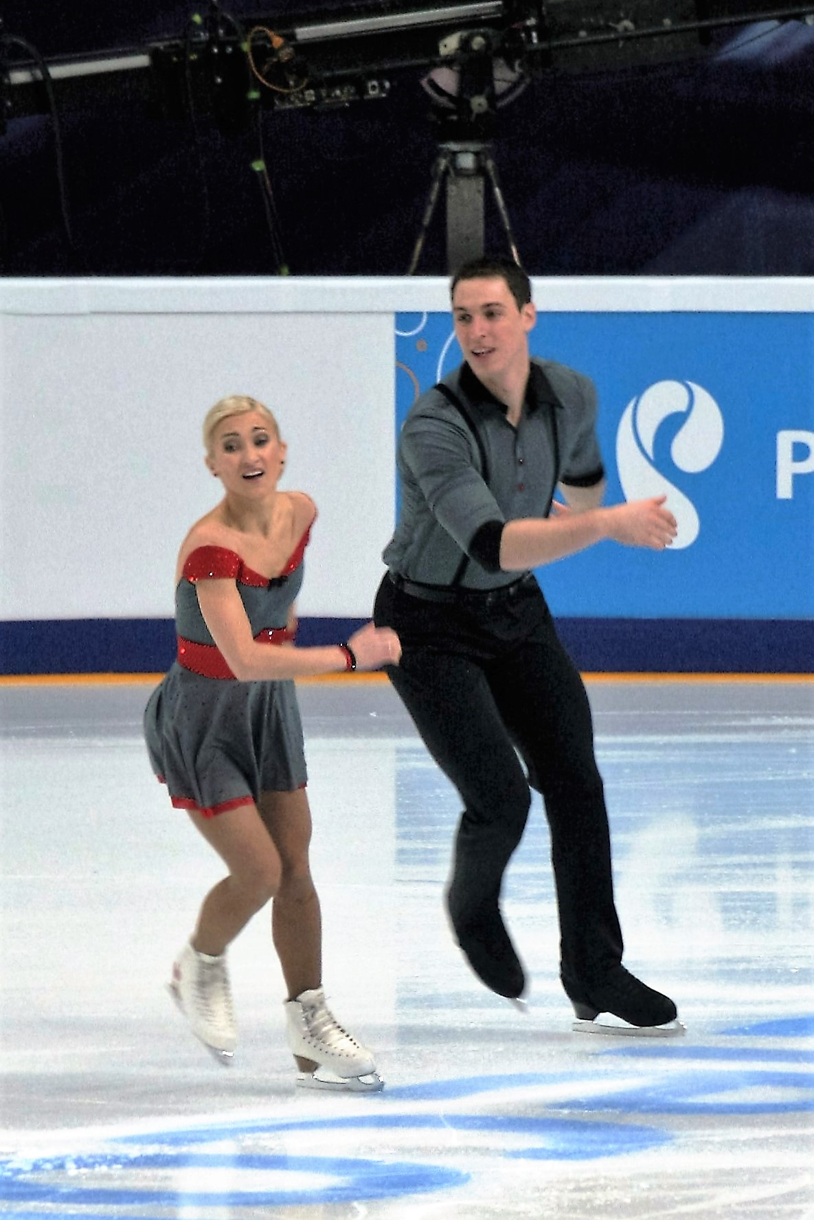 Алёна Савченко / Бруно Массо (Германия) на Кубке Ростелекома 2016.